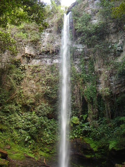 Essa é a cachoeira do Cristal, maior de Santo Antônio do Rio Abaixo.